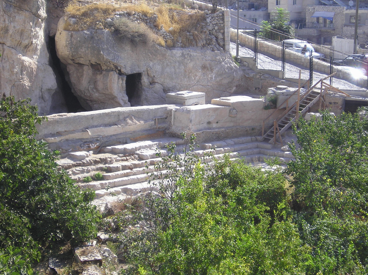 Pool of Siloam - Jerusalem (Photo: Abraham, September 2005)